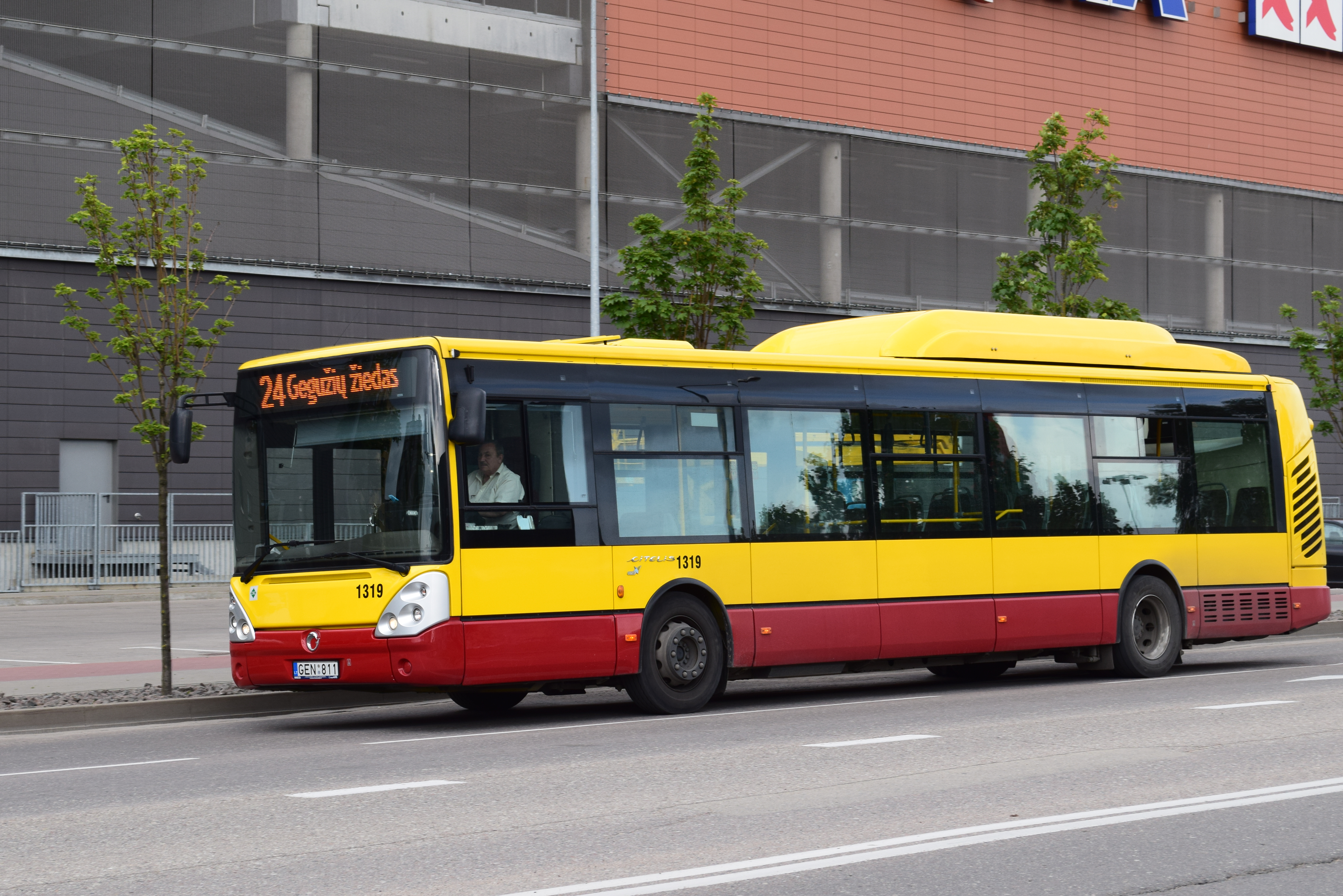 Vienas iš "Busturo" bendrovės 2012 metais įsigytų "Irisbus Citelis 12M CNG" autobusų. Nuotrauka padaryta Luko Aluzo 2014 m. birželio 25 d. Gegužių gatvėje, Šiauliuose.